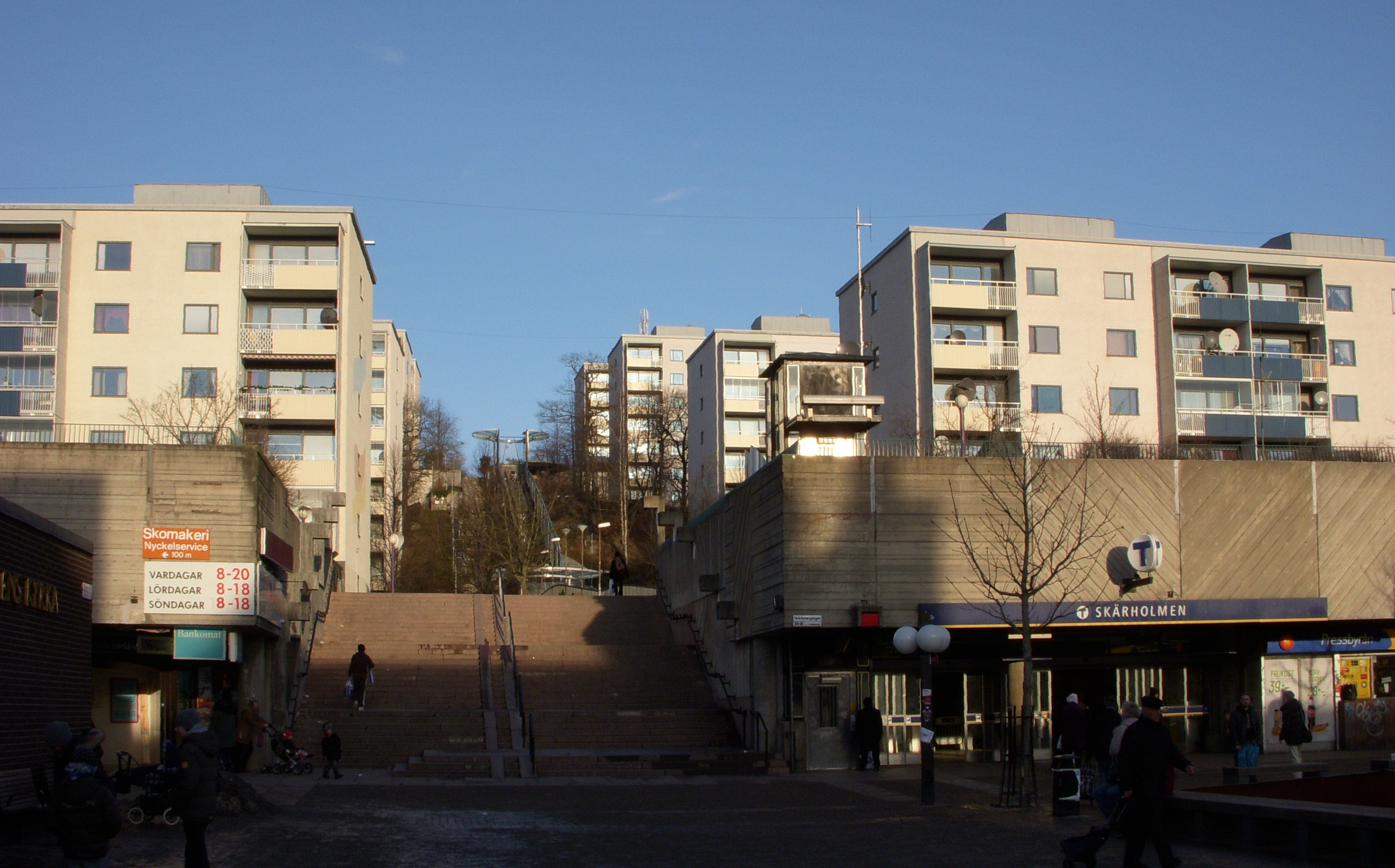 Skärholmens centrum, torget och bostadsområdet